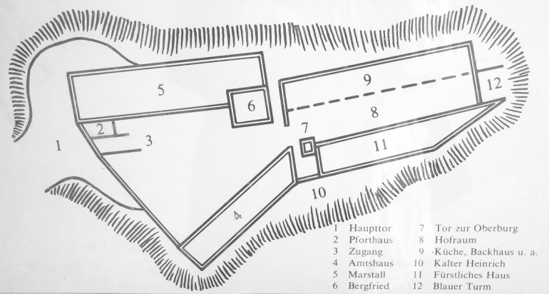 Grundriss Burg Greene, abfotografiert von öffentlich aufgestellter Tafel vor der Burg.